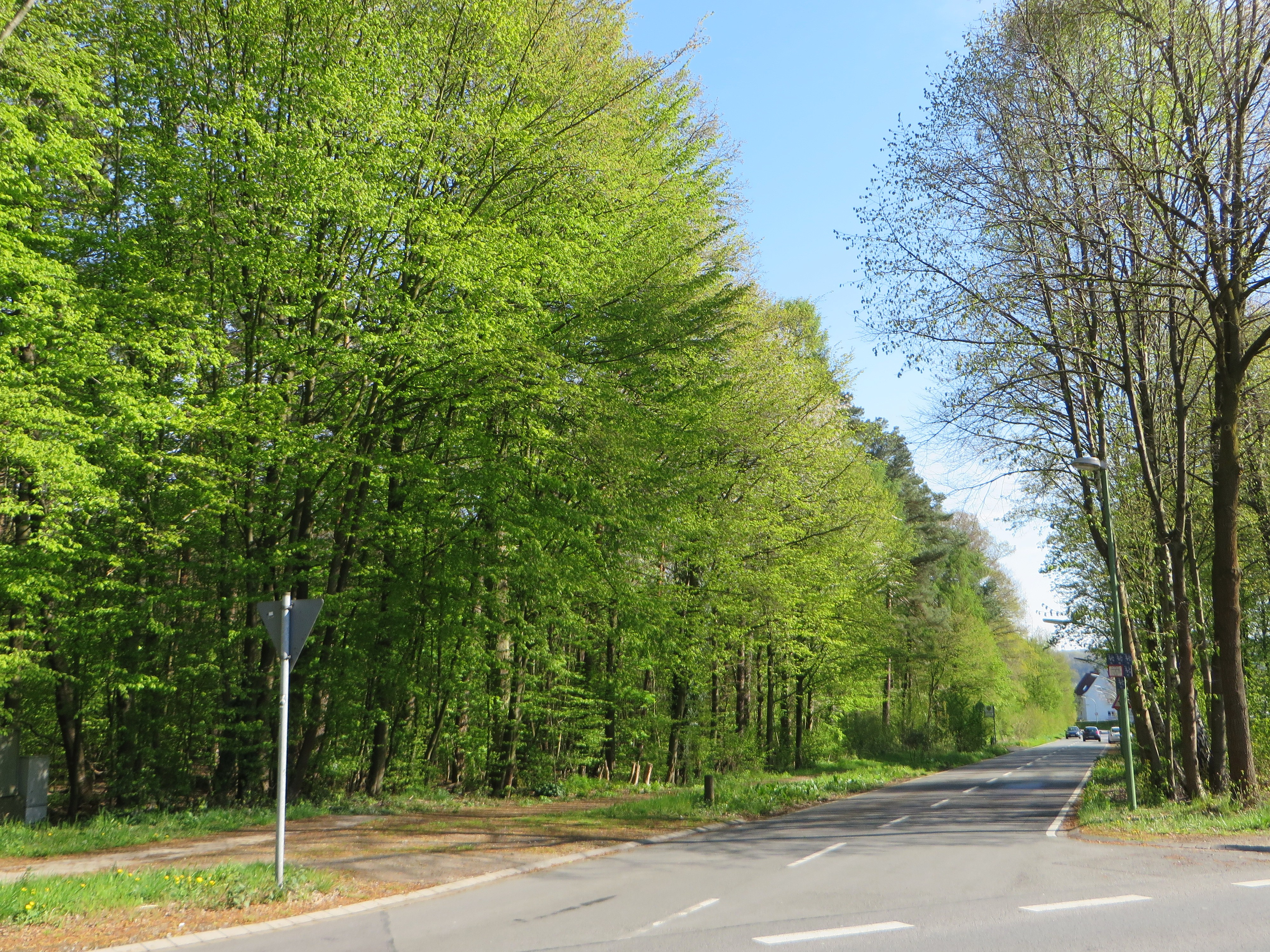 Landschaftsschutzgebiet „Buschbach“ in Hagen-Fley, zwischen Buschstraße, Knippschildstraße Einmündung Weidekampstraße (Foto) und Feldmühlenstraße. Es handelt sich um eine zusammenhängende Waldfläche aus Laub- und Nadelwald, dem Buschbach mit teilweise natürlichem Verlauf sowie mehrere Kleingewässer. In dem Schutzgebiet befindet sich auch ein Wildpark und die Erbgruft von Haus Busch.